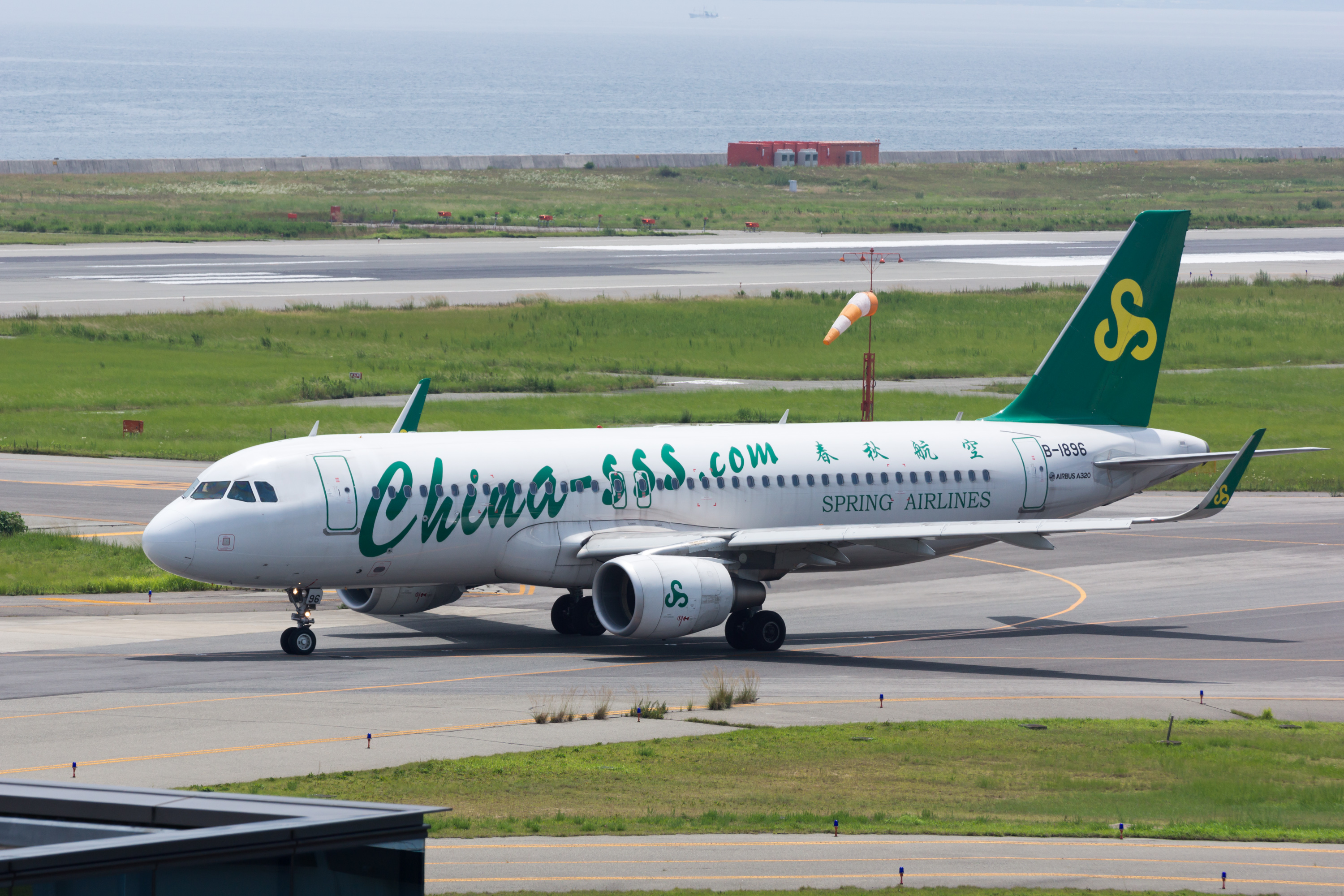 Spring Airlines / 春秋航空 Airbus A320-214 B-1896 9C8590, Departed to Shanghai Osaka Kansai Int'l Airport